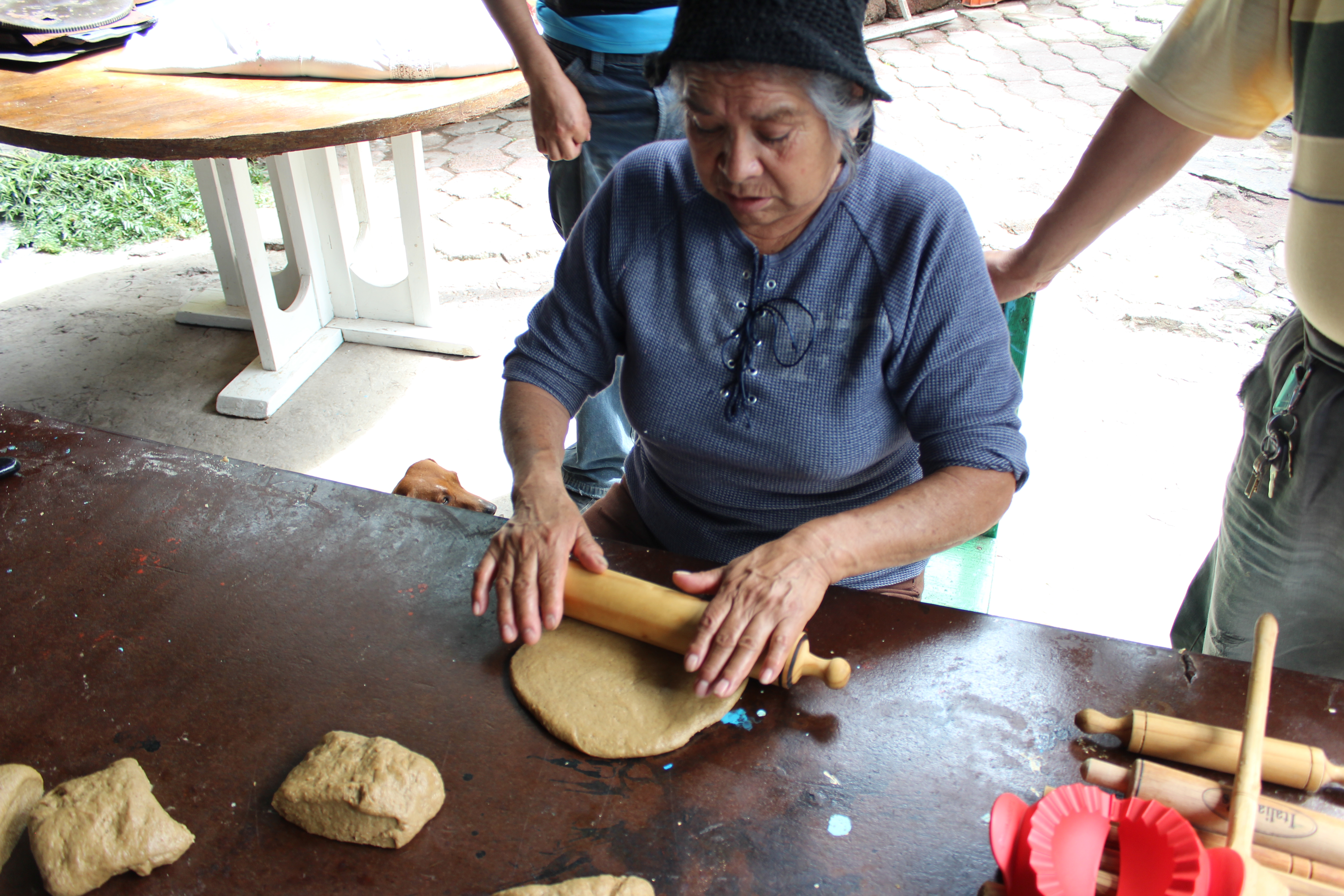 Serie preparación pan de muerto. Nativos de San Joaquín, Texcoco estirando la masa compuesta por harina, piloncillo,mantequilla, levadura, guayaba molida y huevo; con un rodillo para crear el pan.